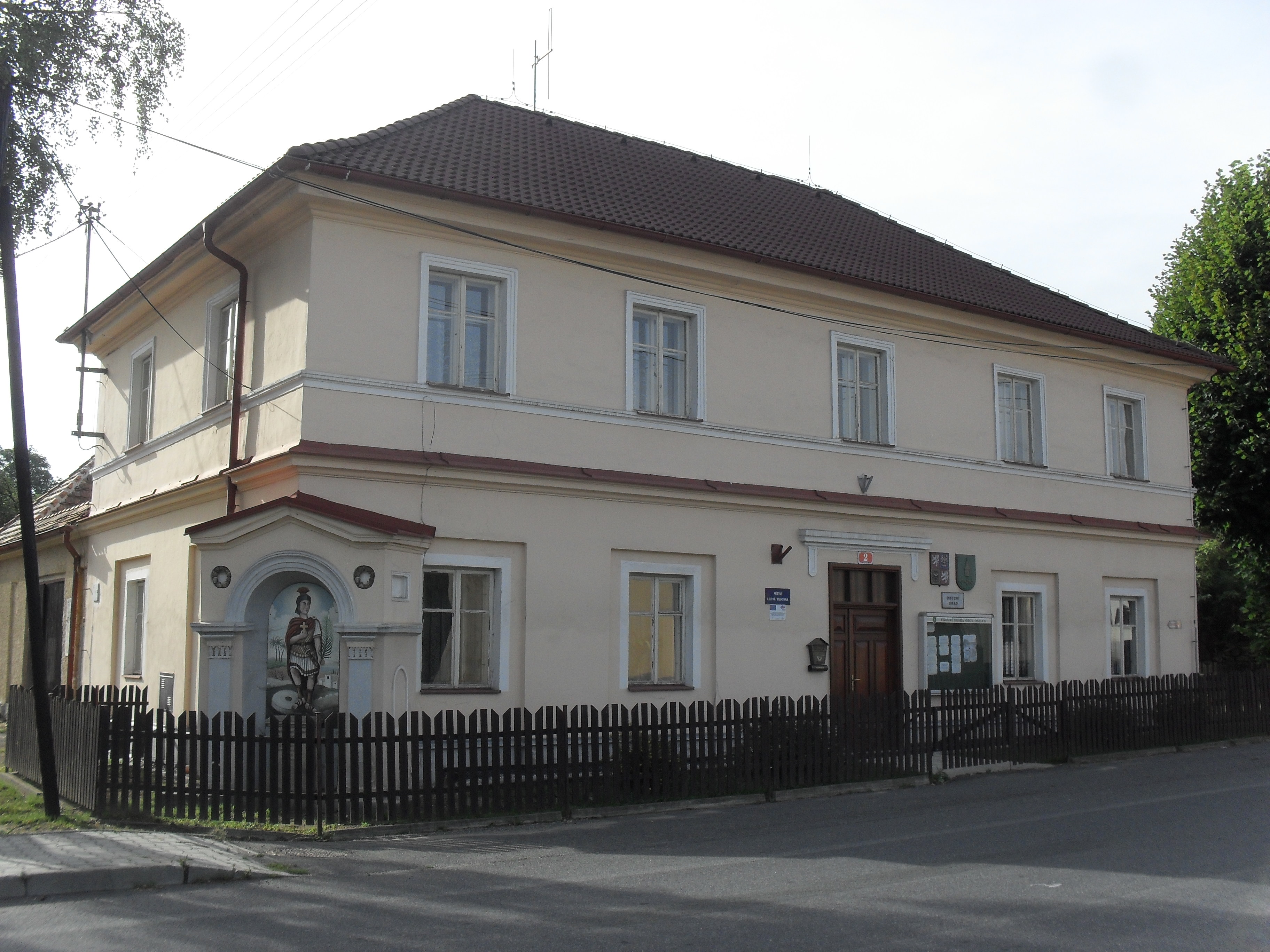 Fotografie pořízena v obci Oselce